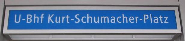 Schild U-Bhf-Kurt-Schumacher-Platz, Berlin-Reinickendorf, November 2004.